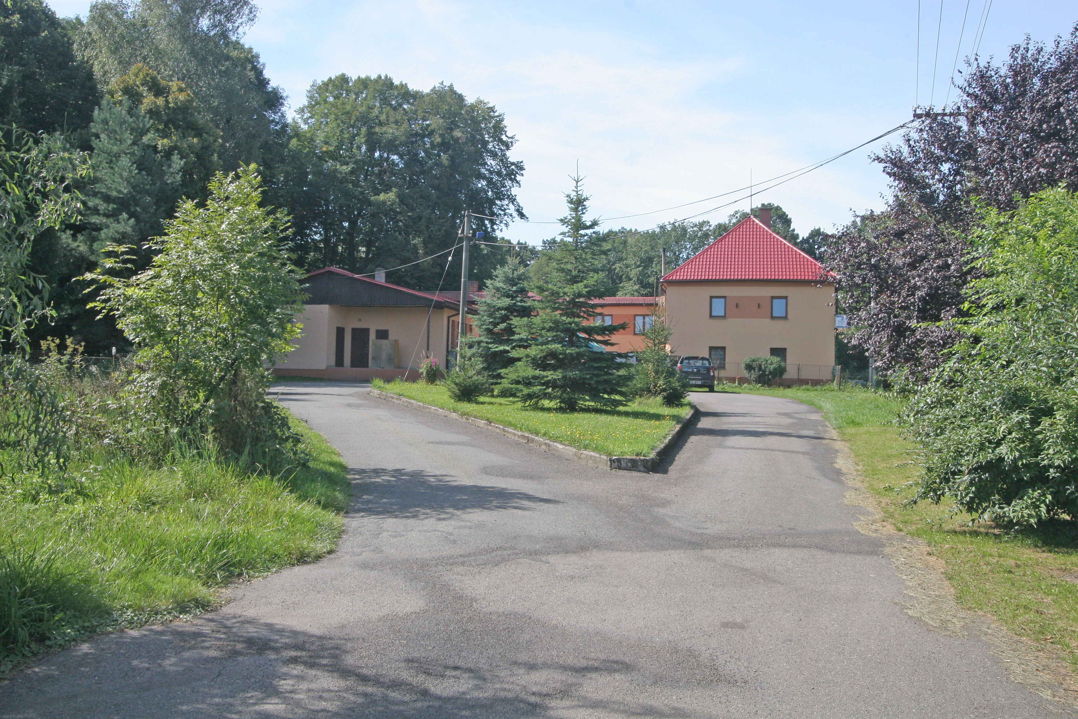 Bukovina u Přelouče obecní úřad